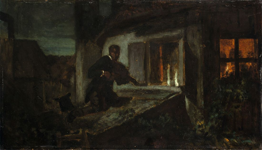 Der Geiger auf dem Dach, Öl auf Papier, auf Pappe aufgezogen. 27,2 x 48,2 cm